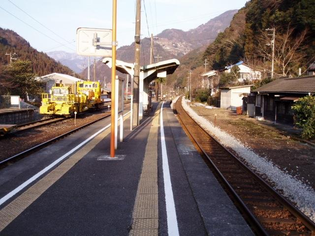 Shikoku Railway Dosan Line Toyonaga Station Platform 四国旅客鉄道 土讃線 豊永駅 駅ホーム